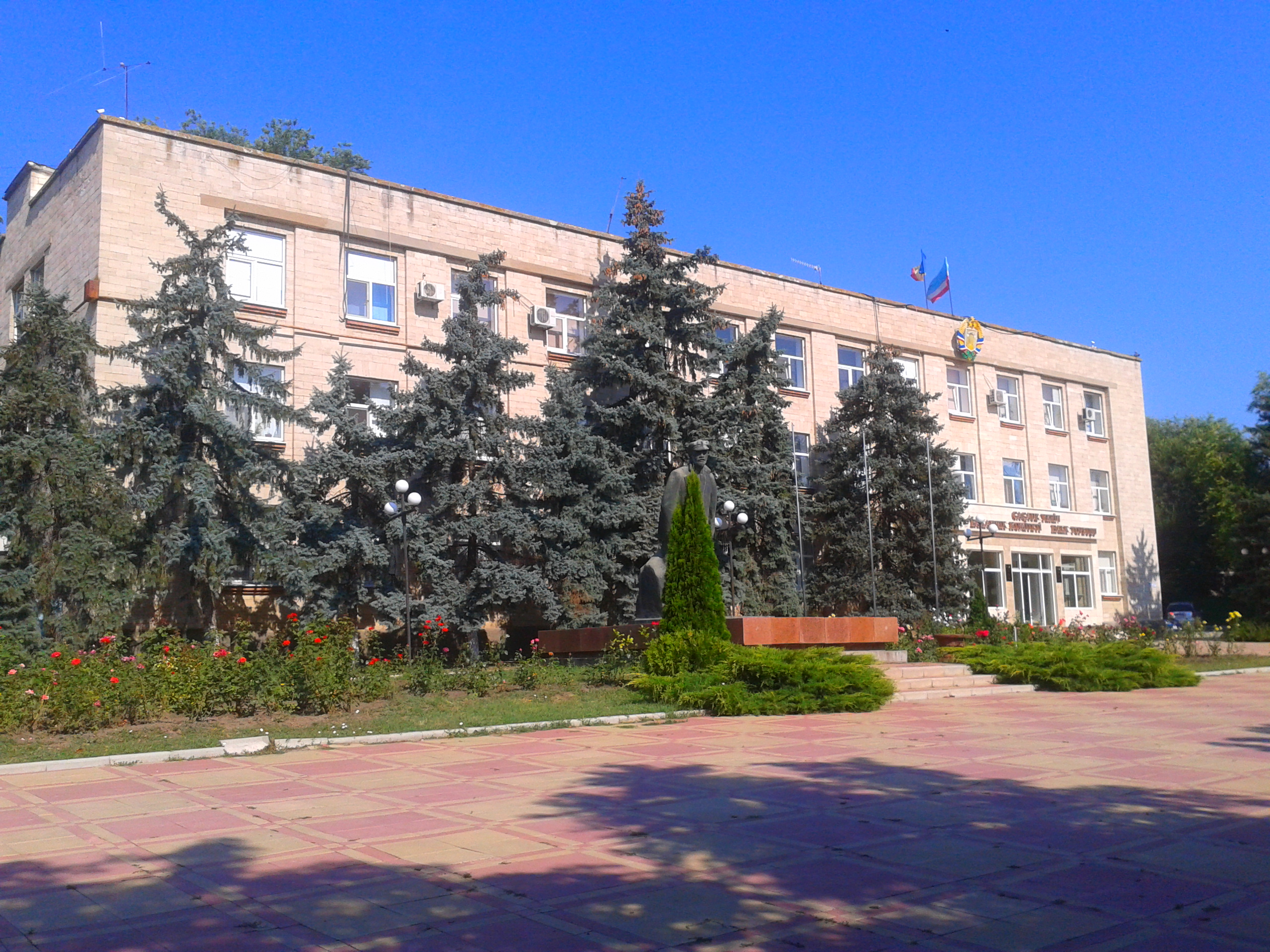 Исполком Гагаузии